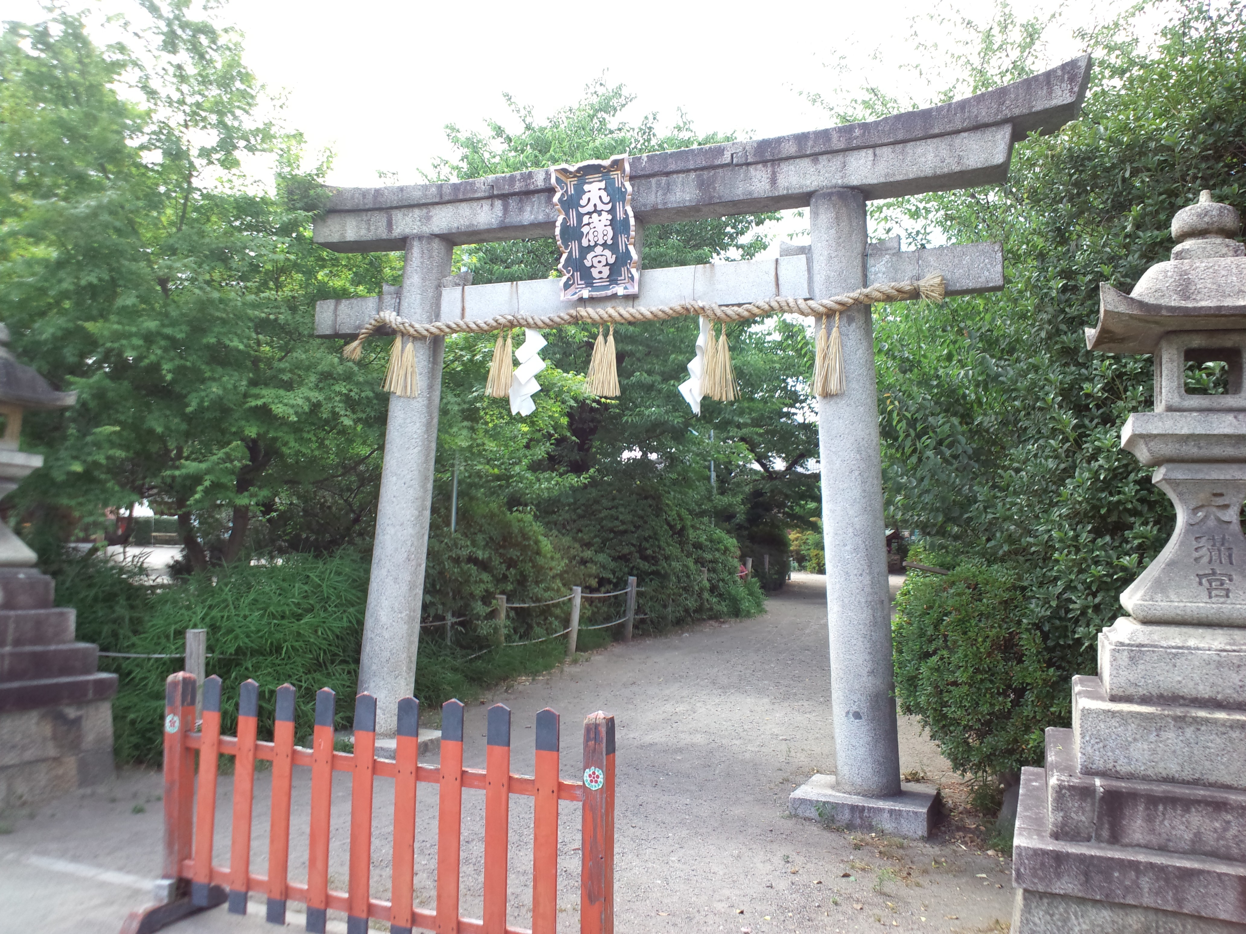 吉祥院天満宮 入口の鳥居